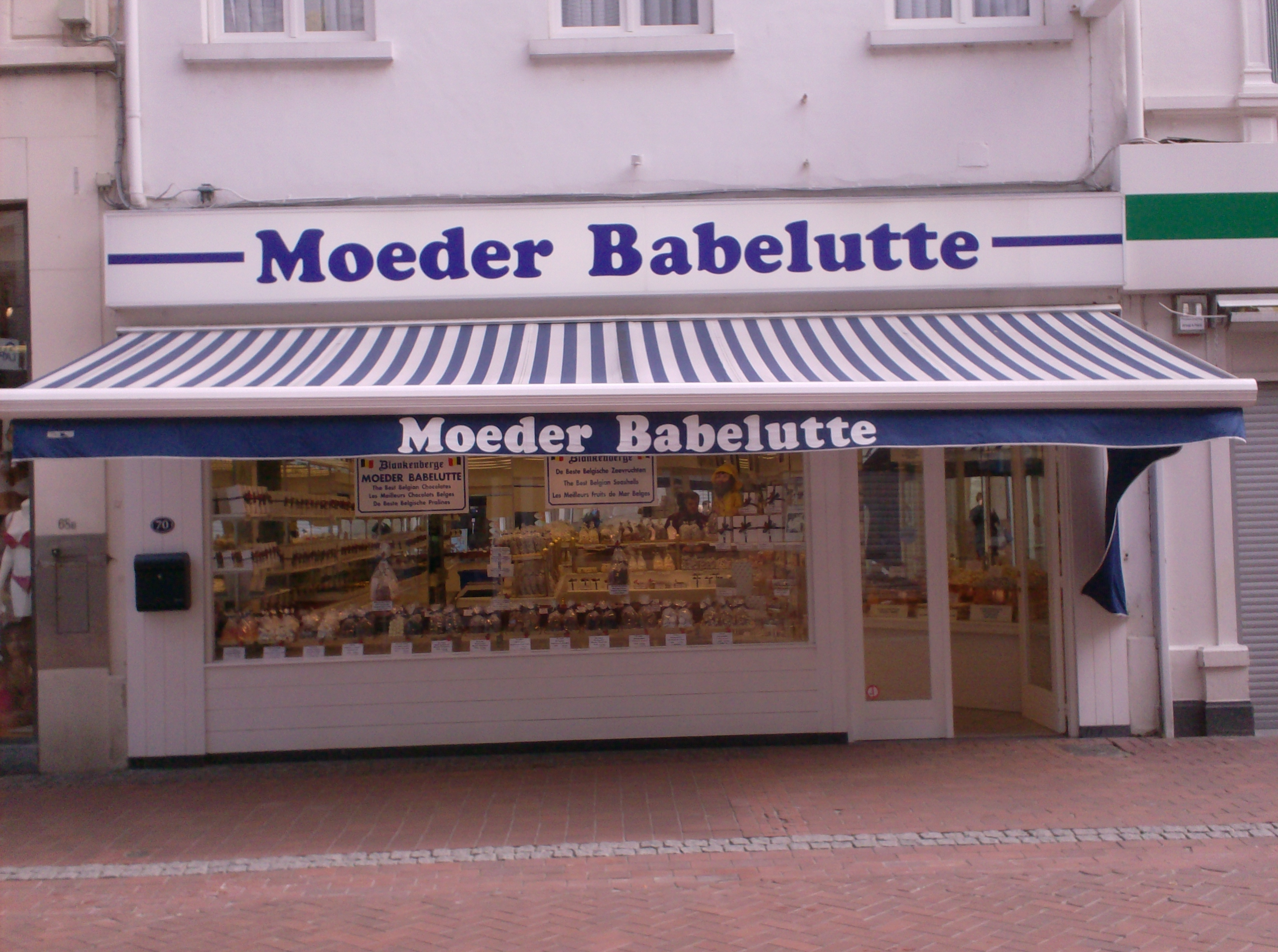 'n Snoepwinkel in België.